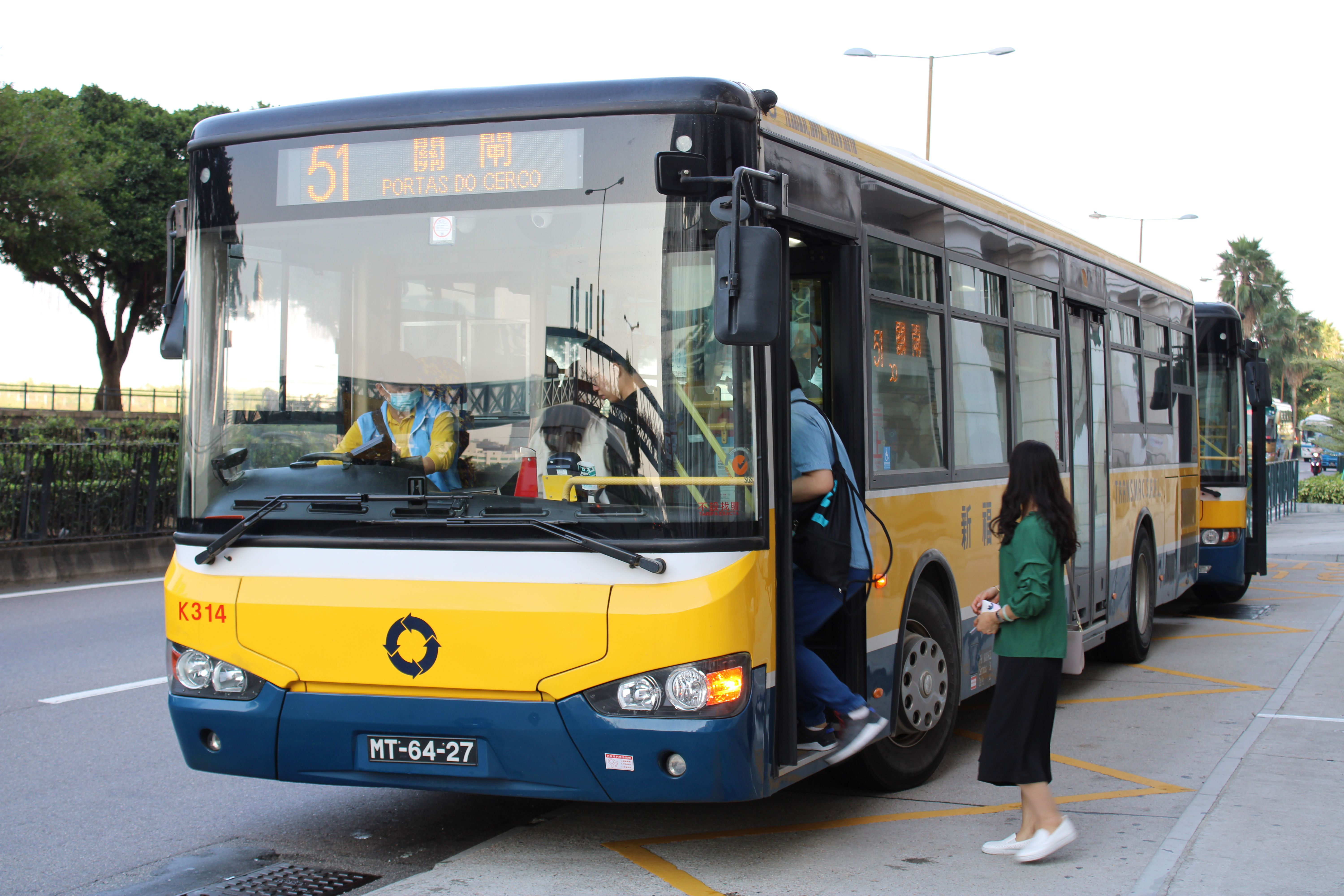 新福利蘇州金龍KLQ6129GQE4行駛51路線。